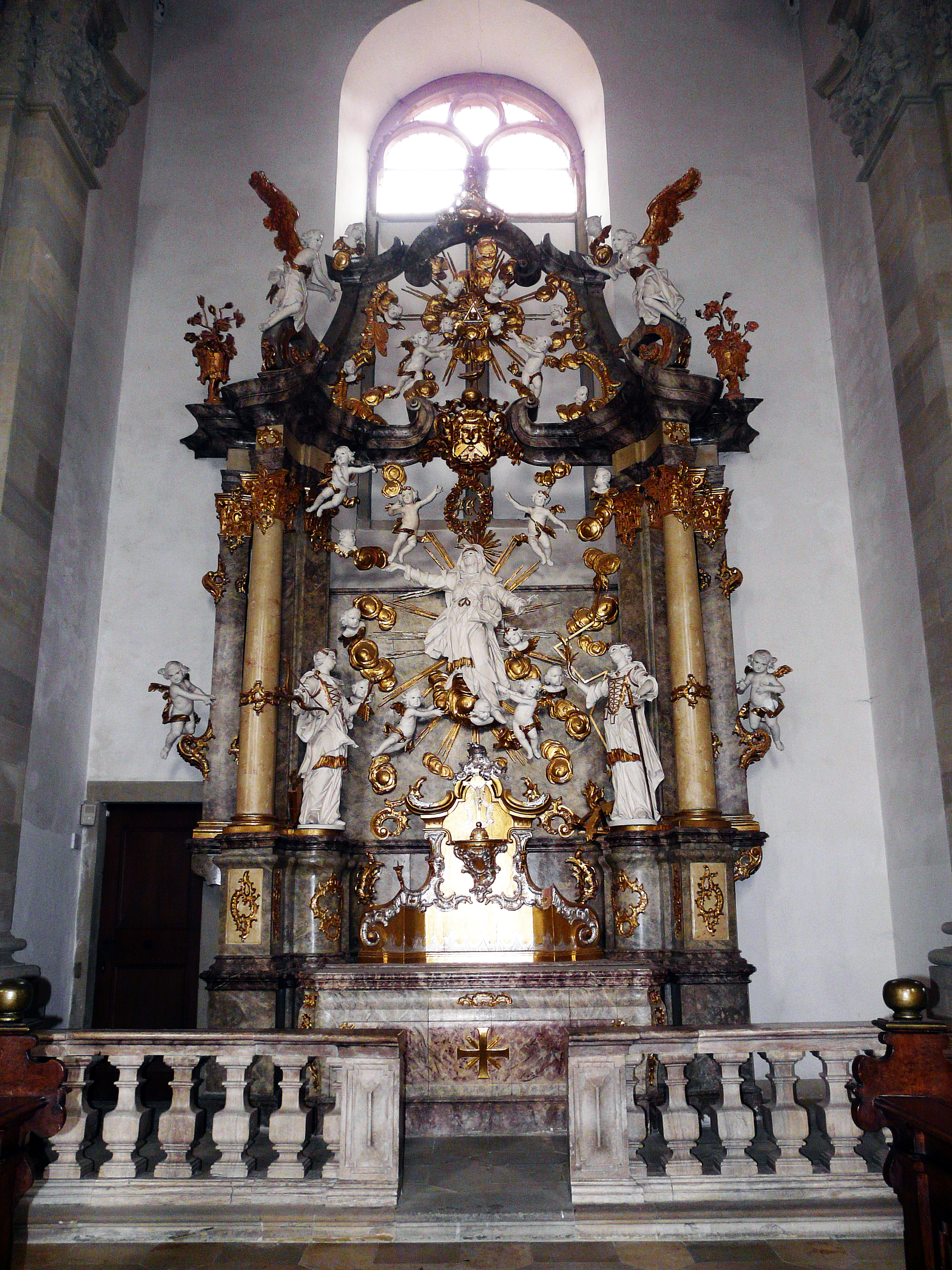 Алтарь св. Анны